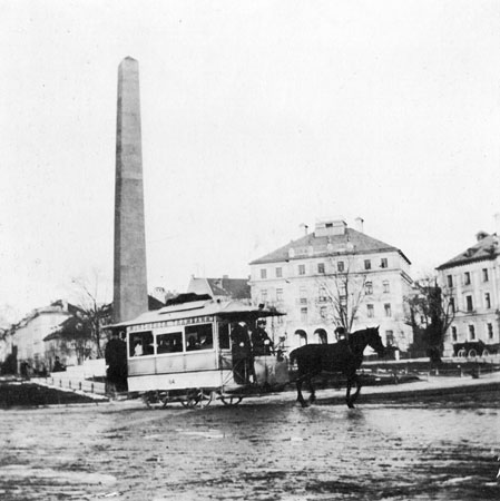 München, Pferdetrambahn am Karolinenplatz